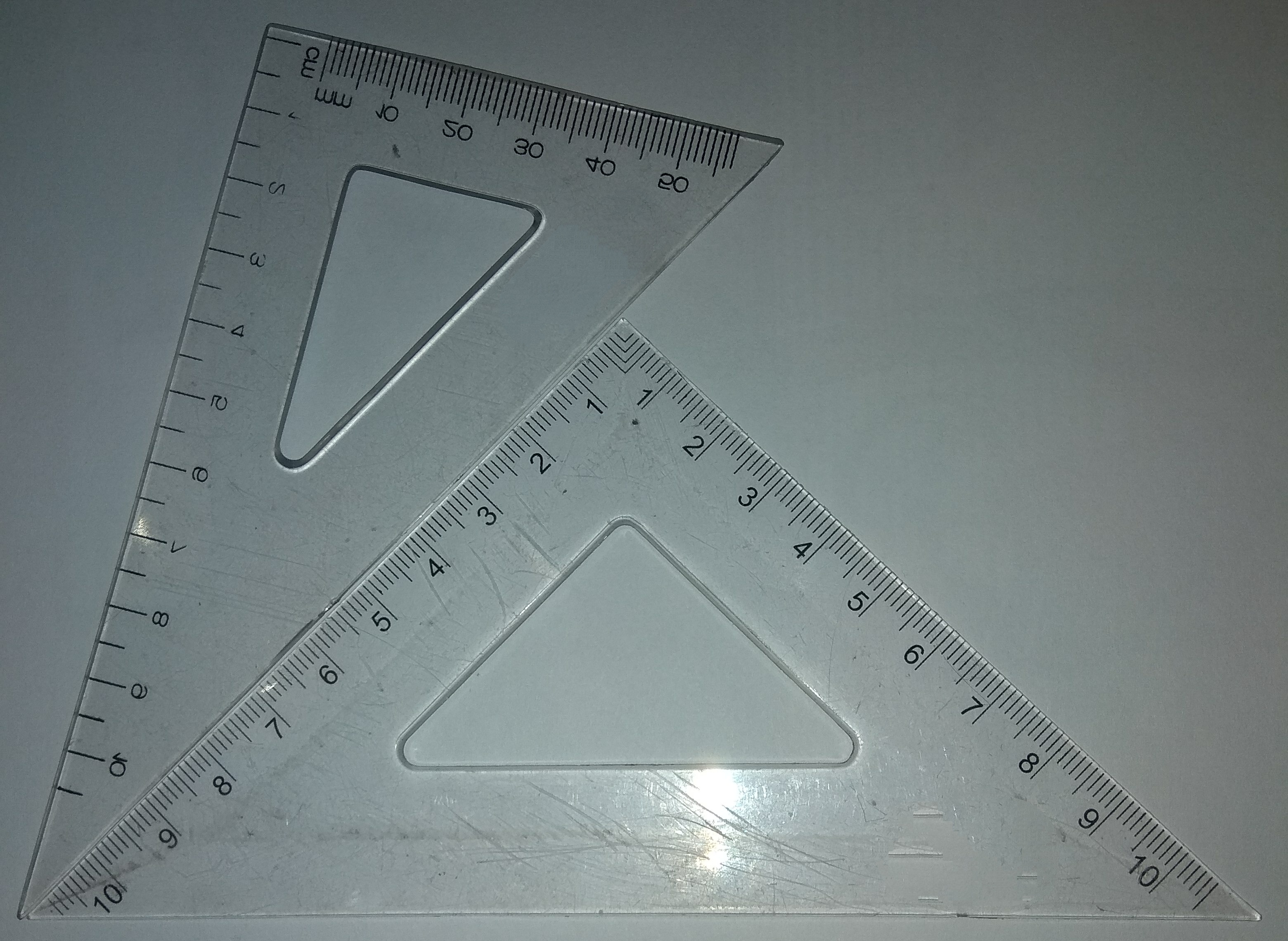 Начертание сетки с помощью угольников